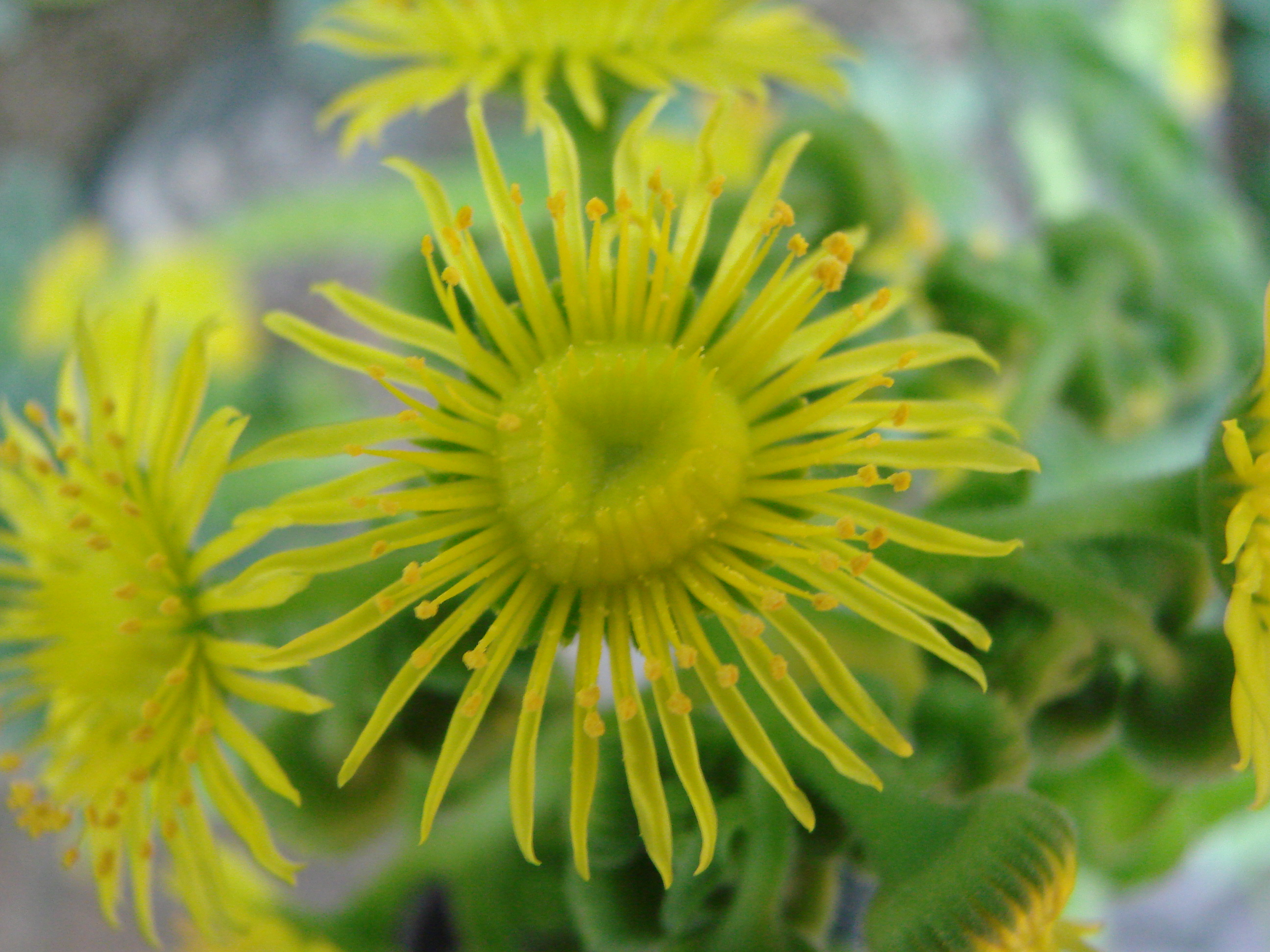 Jardin botanique de l'Université de Zurich (Suisse) : Greenovia dodrantalis (Willd.) Webb & Berth